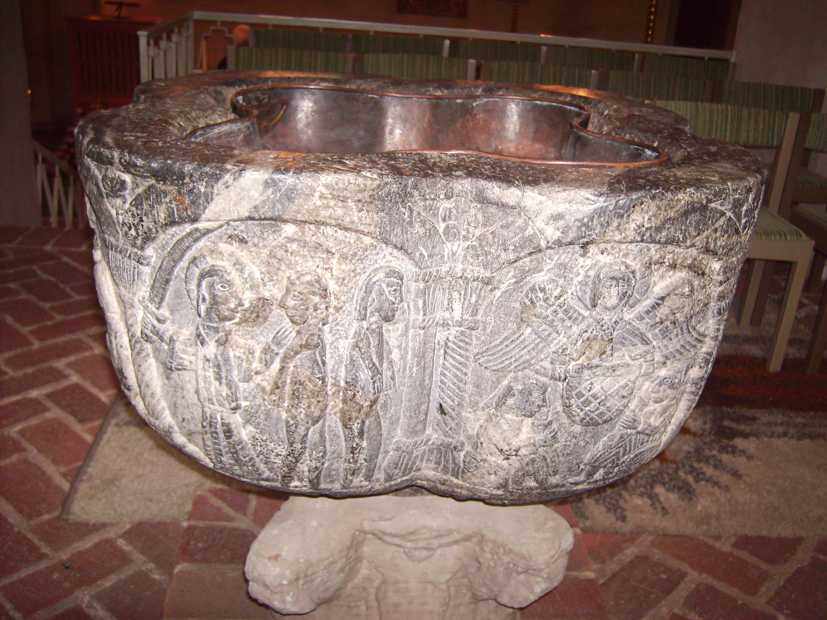 Östra Eneby kyrka, a Middle Age church in Norrköping (interior, medieval baptismal font).